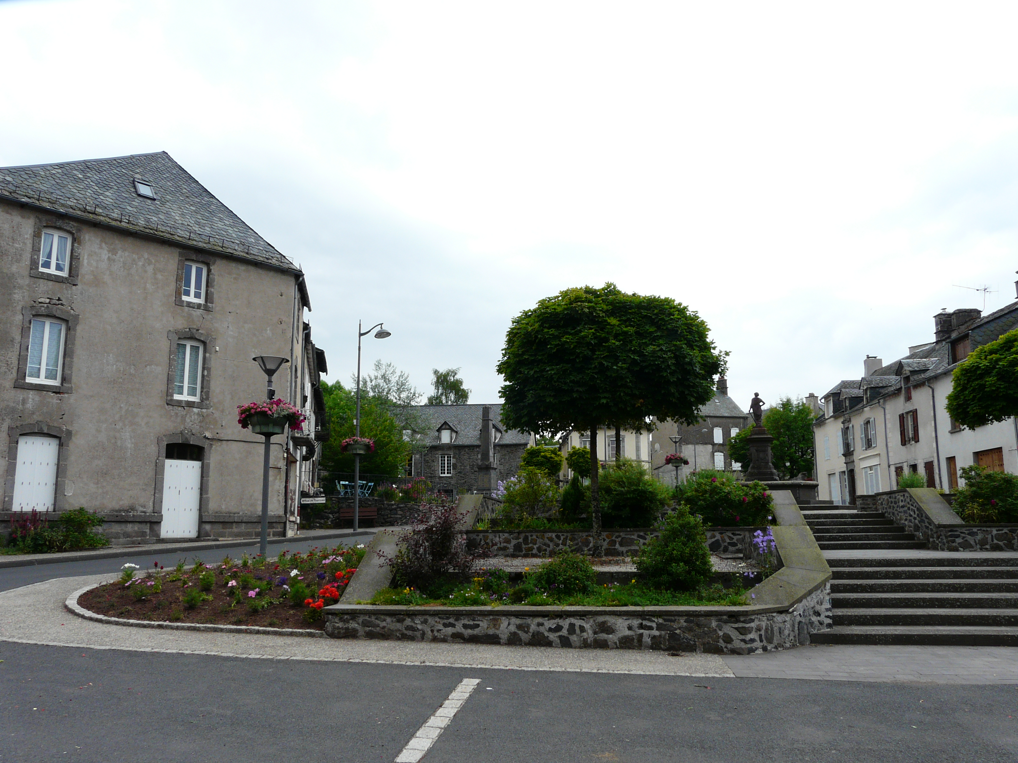 Place du village de Marcenat, Cantal, France.